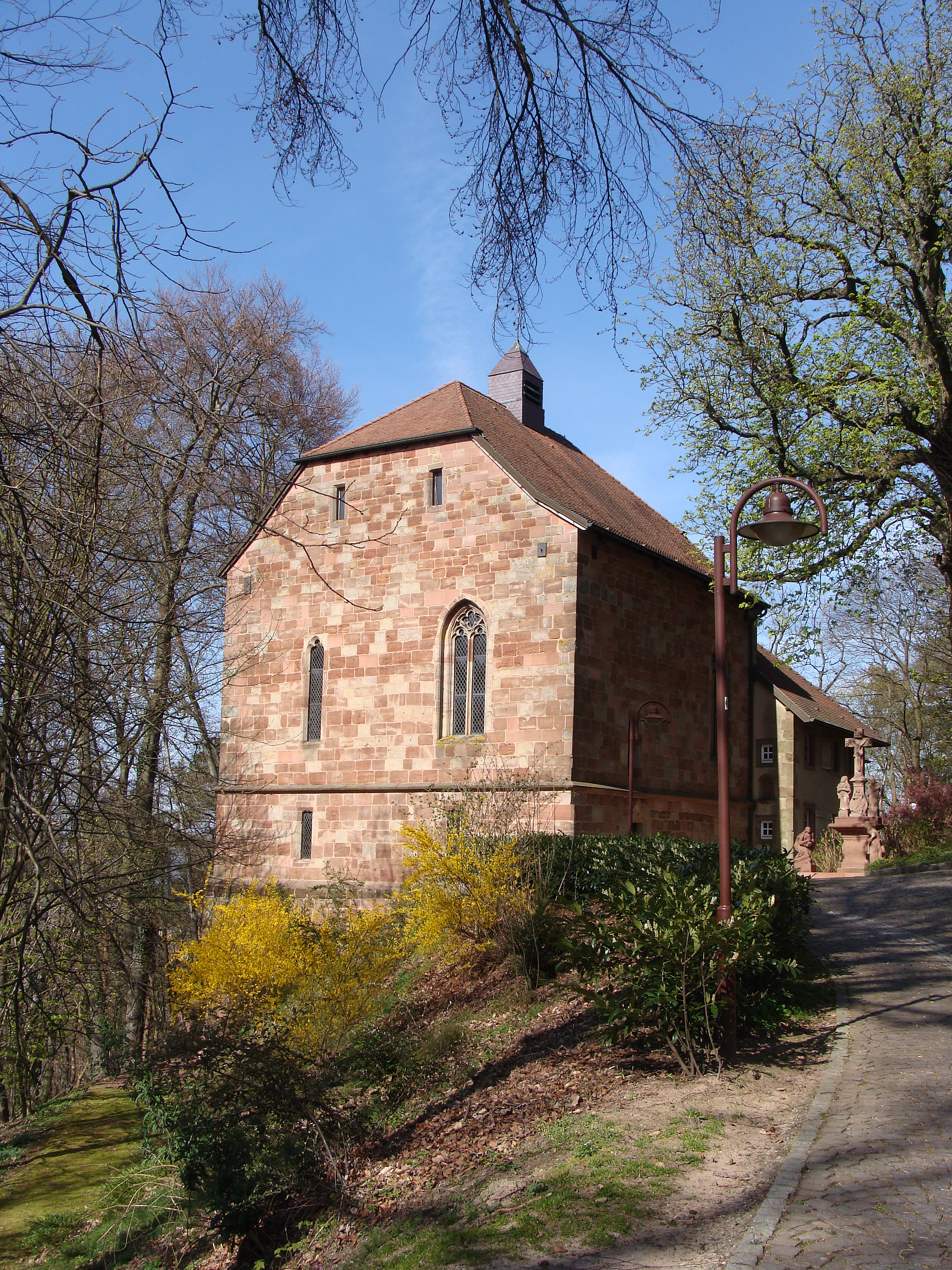 Chapelle gothique (XIIIe) appelée chapelle Sainte-Croix de Forbach (Moselle). Vue latérale. Avril 2014.